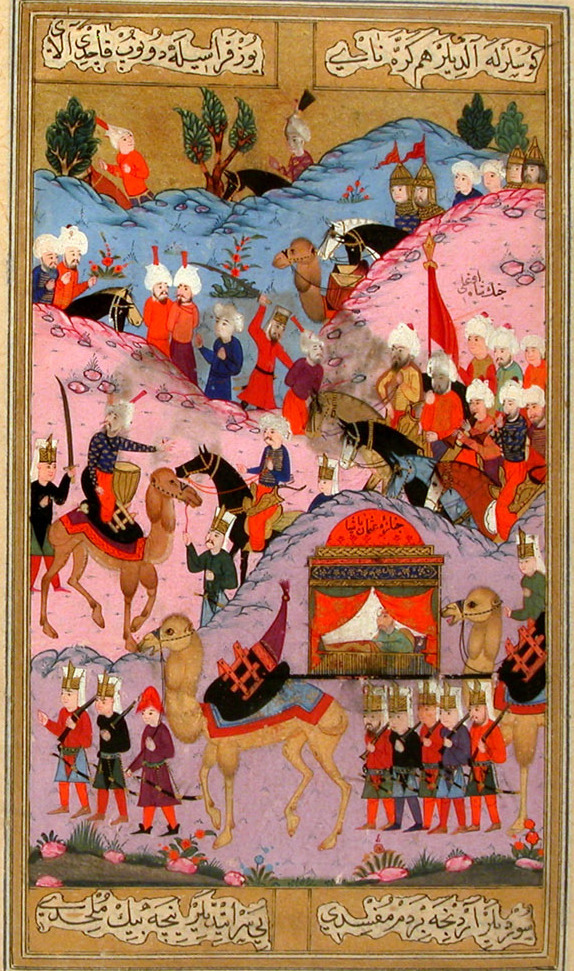 Secaatname 0282